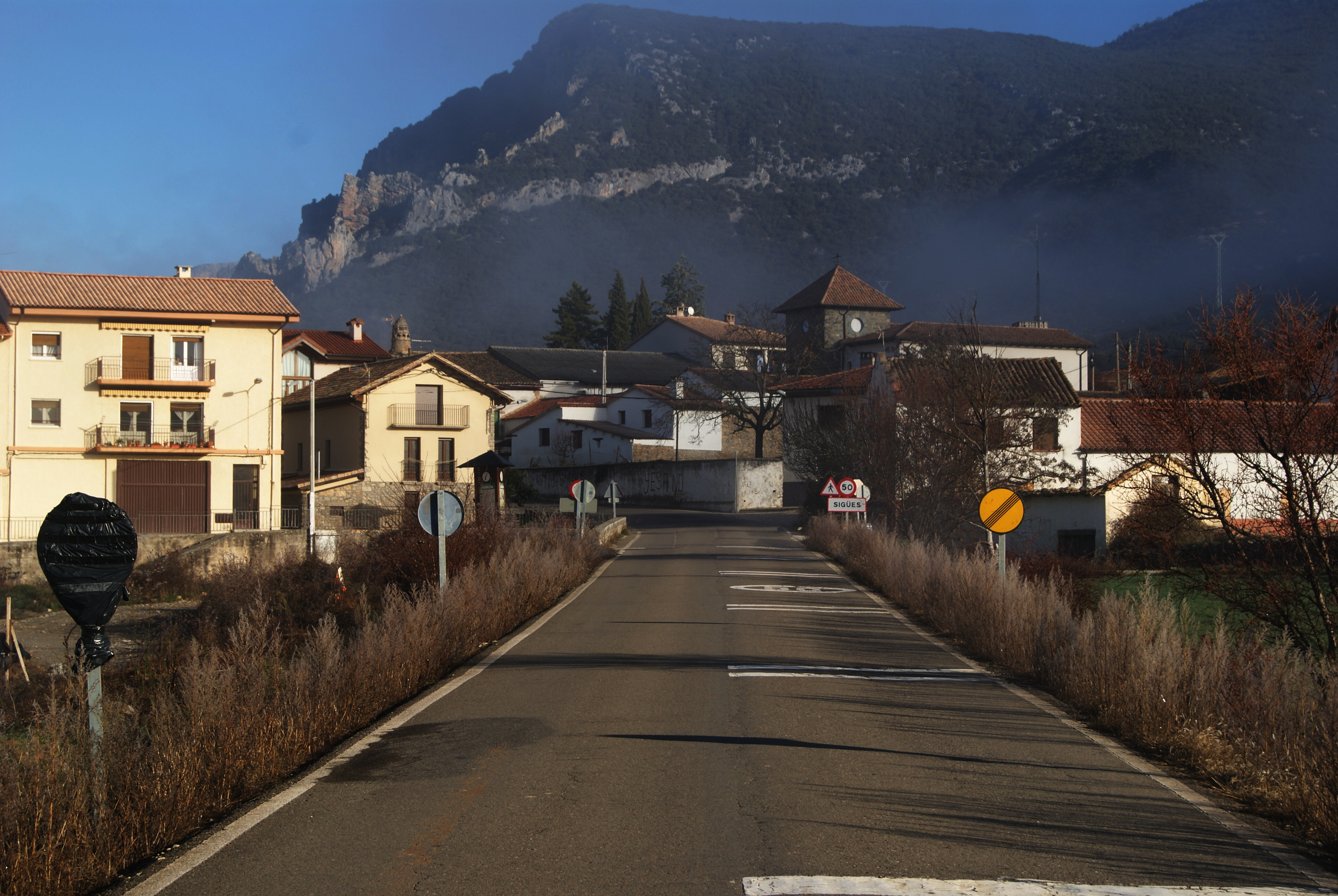 Sigües (población)